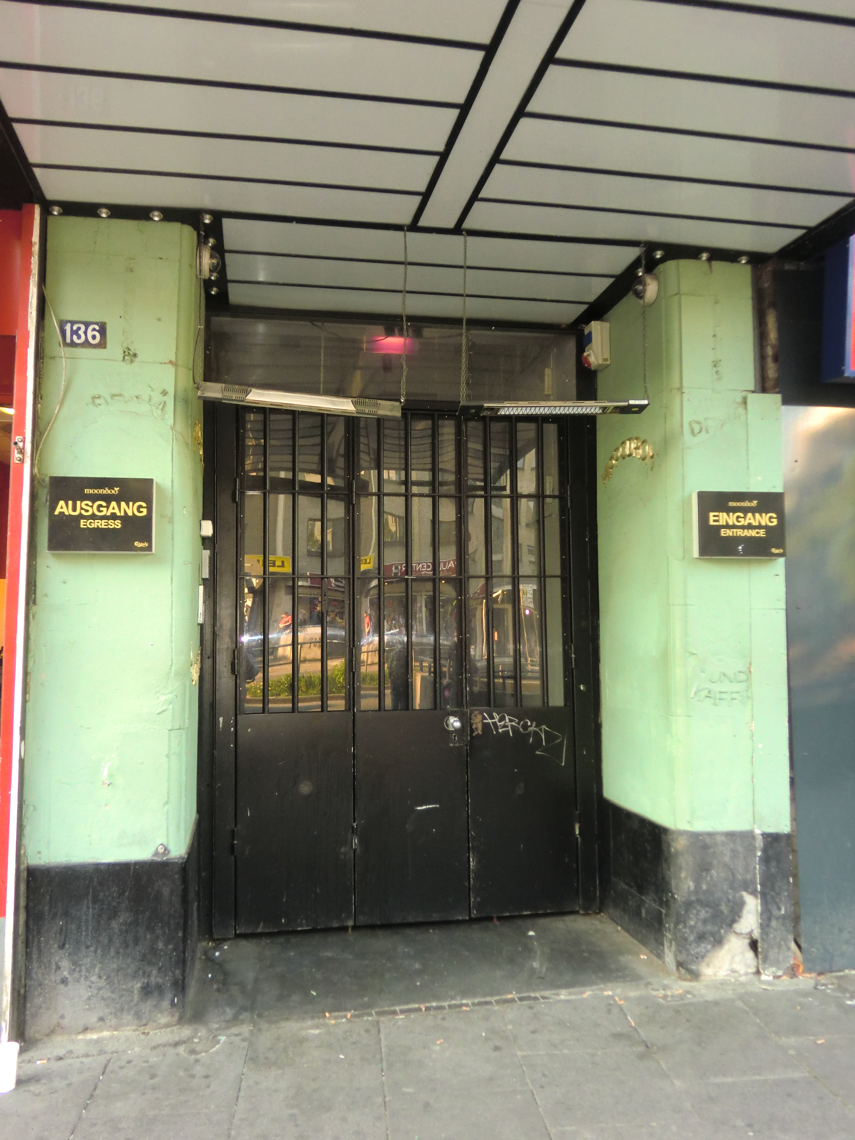 Ehemaliger Top Ten Club, Reeperbahn 136, ehemals Hippodrome. Eröffnung im November 1960 von Peter Eckborn; die Beatles spielten hier vom 01. bis zum 05.12.1960 ohne George Harrison. John Lennon bis zum 12.12.; am 27.03.1961 traten sie hier ihr offizielles Engagement an, ebenfalls 7 Tage in der Woche, 40 DM pro Tag. Tony Sheridan war hier Haussänger und hatte einen langfristigen Vertrag.